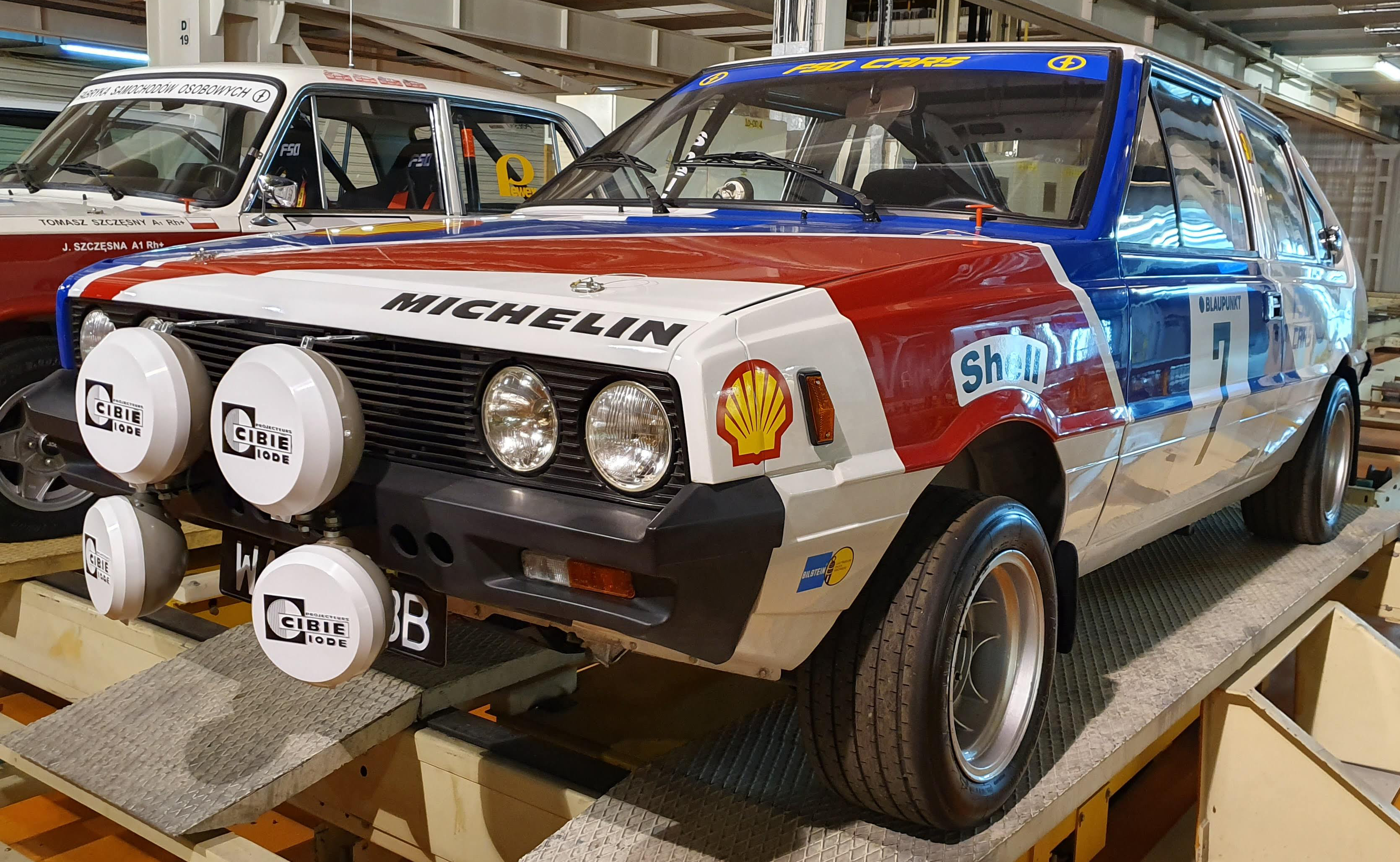 Rajdowy FSO Polonez Coupé 1600 na wystawie Klasyki w FSO.